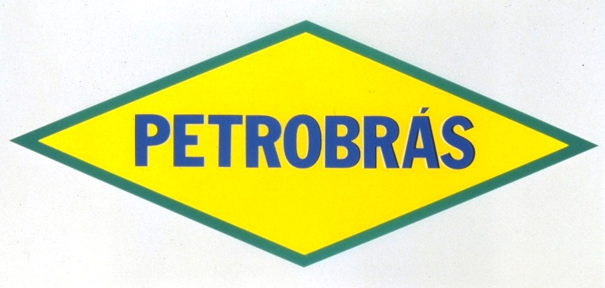 Primeira logomarca de PETROBRÁS.